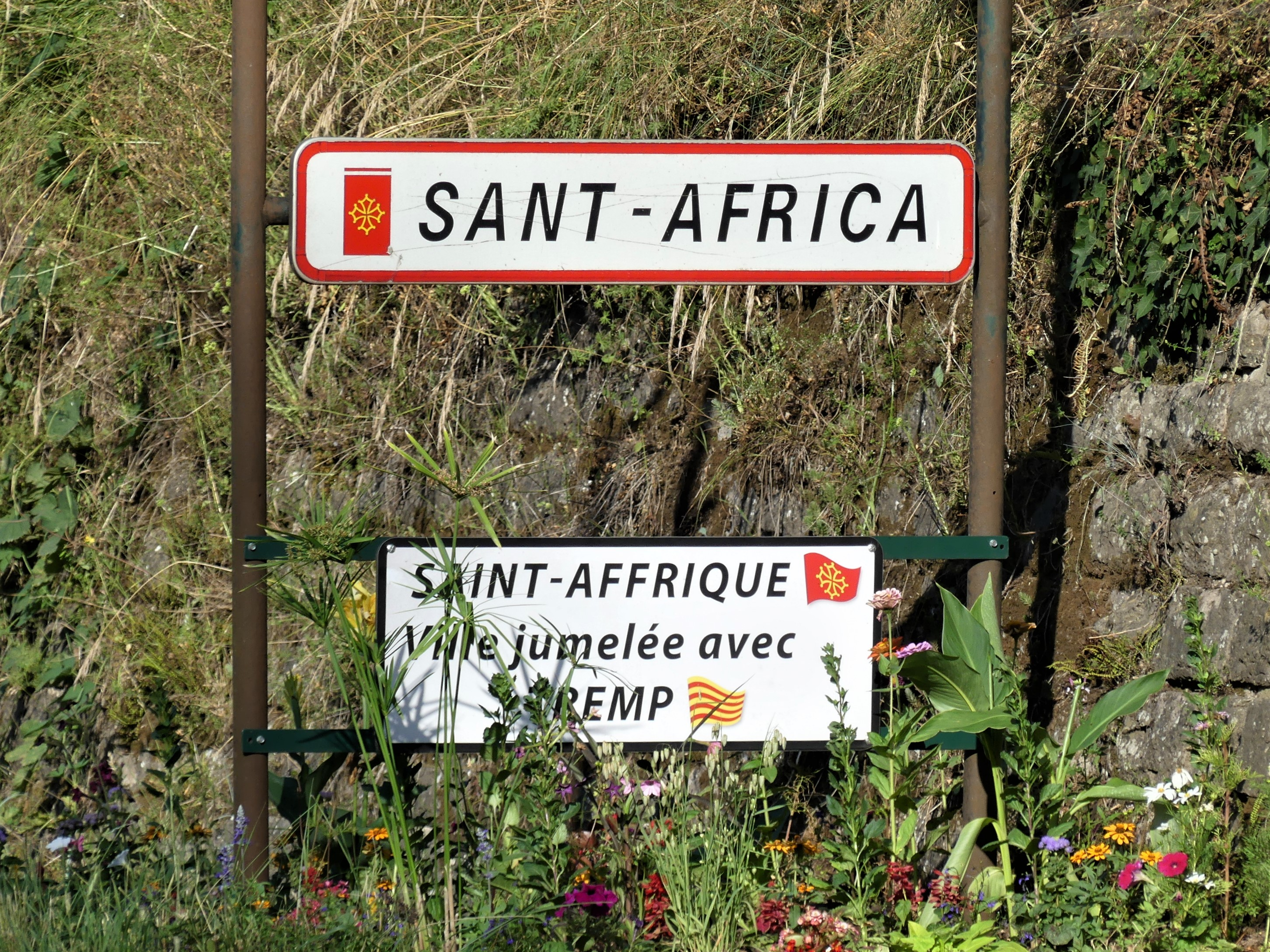 Panneau de jumelage avec la commune catalane de Tremp, Saint-Affrique, Aveyron, France.